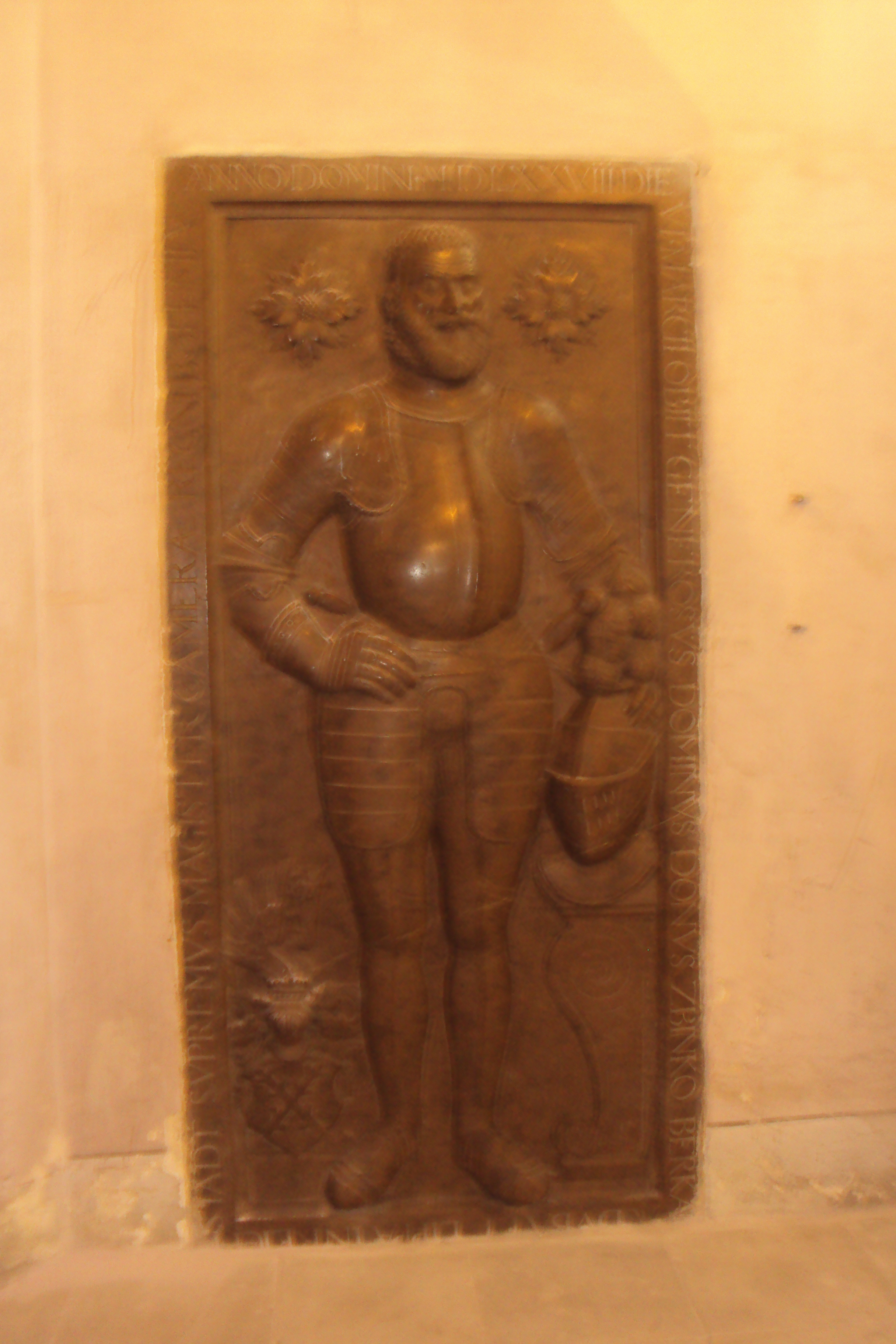 Relief náhrobku Zbyňka Berky v Zákupském kostele